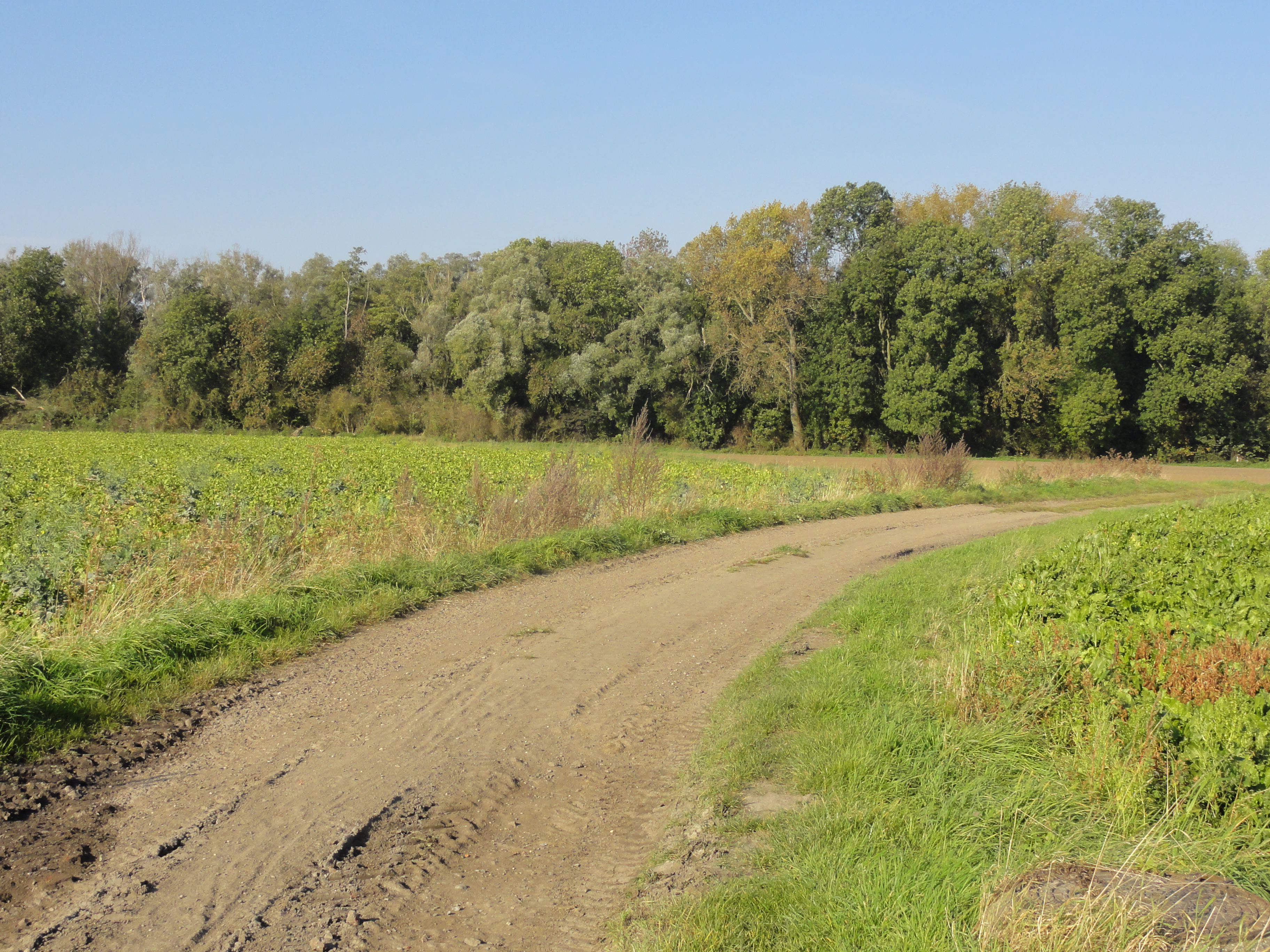 Terril n° 70E dit 3 - 4 de Meurchin Marais, Fosse n° 3 - 4 de la Compagnie des mines de Meurchin, Meurchin, Pas-de-Calais, Nord-Pas-de-Calais, France.